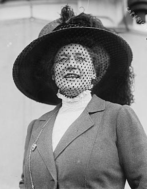 Olive Fremstad (1871 - 1951), Swedish-American mezzo-soprano and soprano opera singer